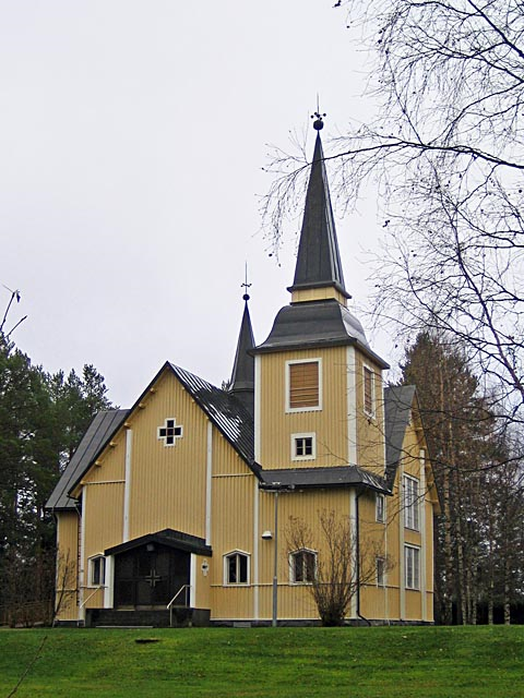 Ranuako eliza